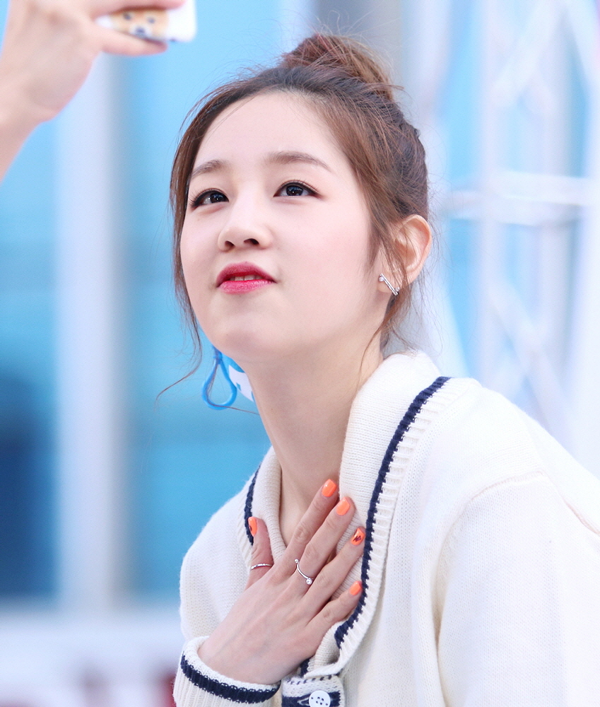 150509 신촌 유플렉스 팬싸인회 박보람